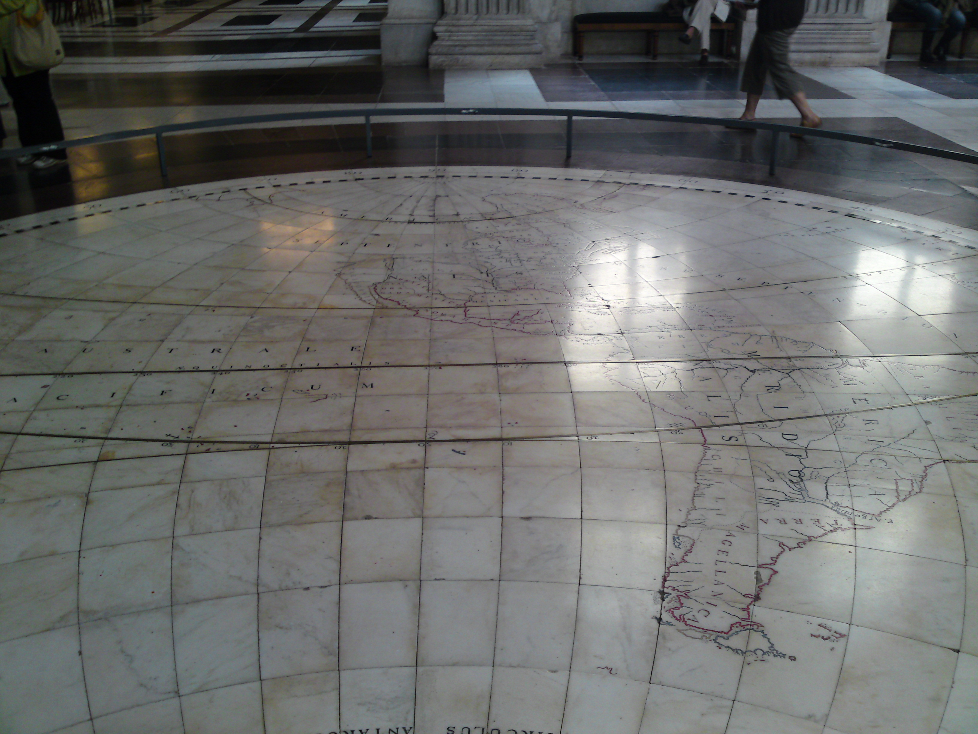 Kaart in de Burgerzaal van het Paleis op de Dam.